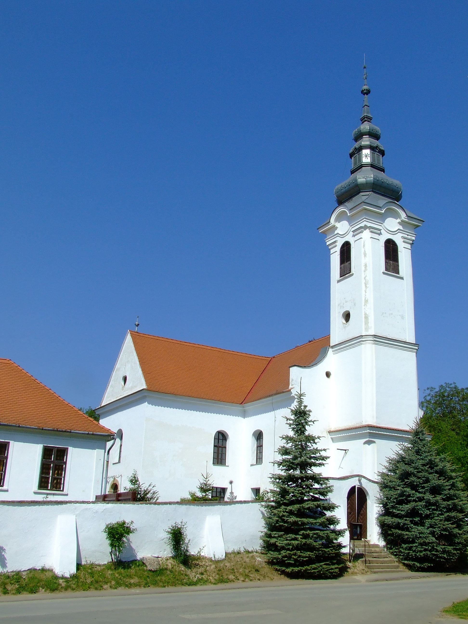 A zengővárkonyi református templom. Épült késő barokk stílusban 1787 és 1802 között. A templom lelkésze volt 1928 és 1947 között Fülep Lajos művésuzettörténész, a Magyar Tudományos Akadémia levelező tagja. A lelkészlakban Fülep Lajos és Császár János emlékszobát rendeztek be.